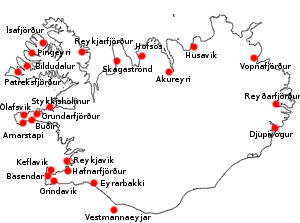 Kauphafnir á Íslandi 1602-1787 Endurgerð á korti úr Gísla Gunnarssyni: Upp er boðið Ísaland - Einokunarverslun og íslenskt samfélag 1602-1787, Örn og Örlygur, 1987